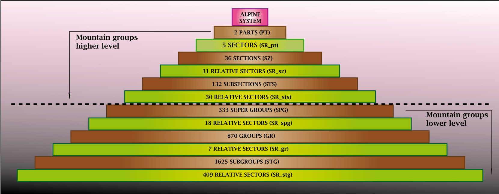 Pyramide soiusa